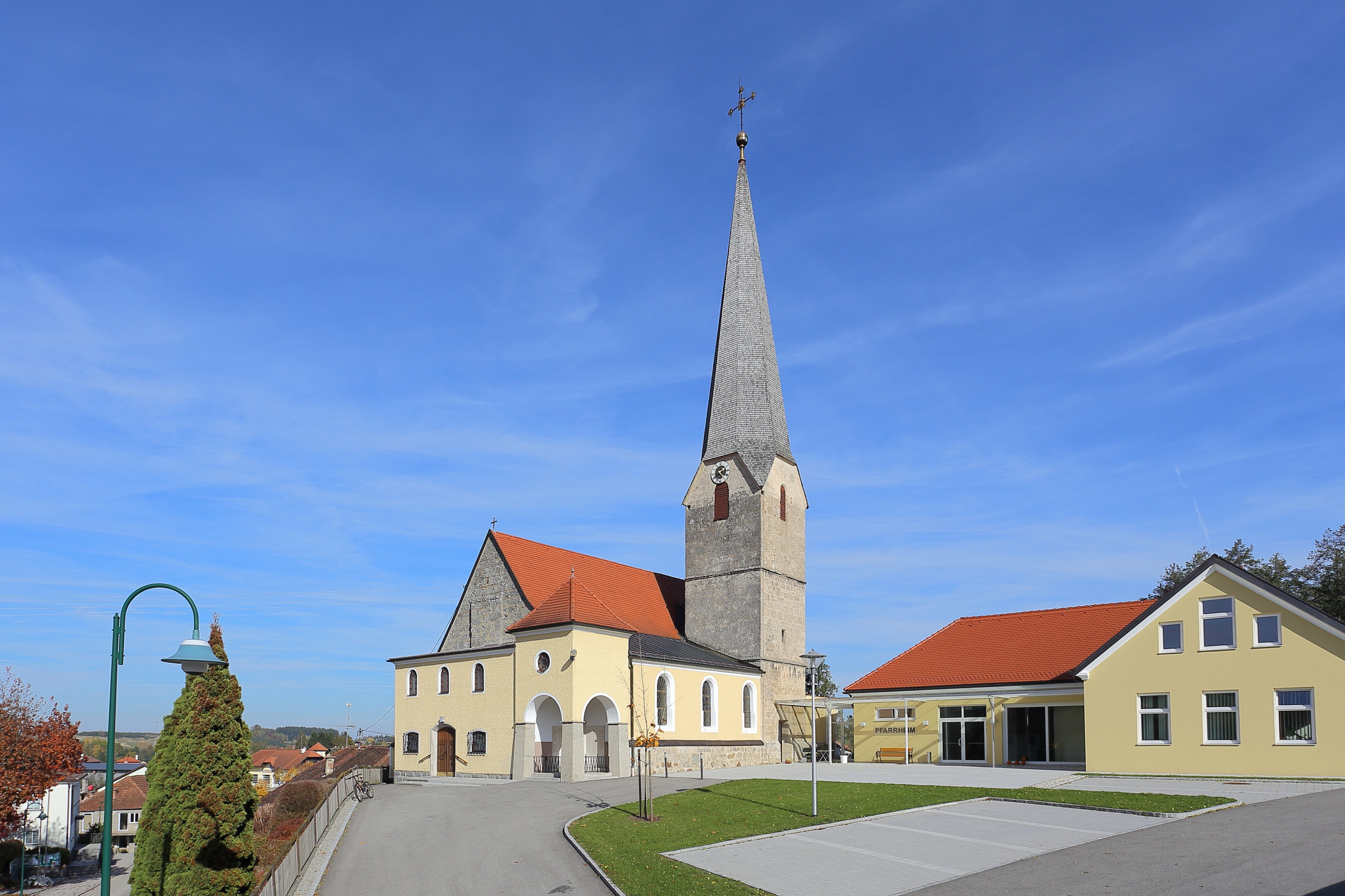 Südwestansicht der katholischen Pfarrkirche hl. Kreuz in der oberösterreichischen Gemeinde Senftenbach. Eine spätgotische Kirche mit einem einschiffigen, dreijochigen Langhaus, einem leicht eingezogenen einjochigen Chor und einem Turm im südlichen Chorwinkel. Ende des 19. Jahrhunderts wurde südseitig ein dreijochiges Seitenschiff angebaut.